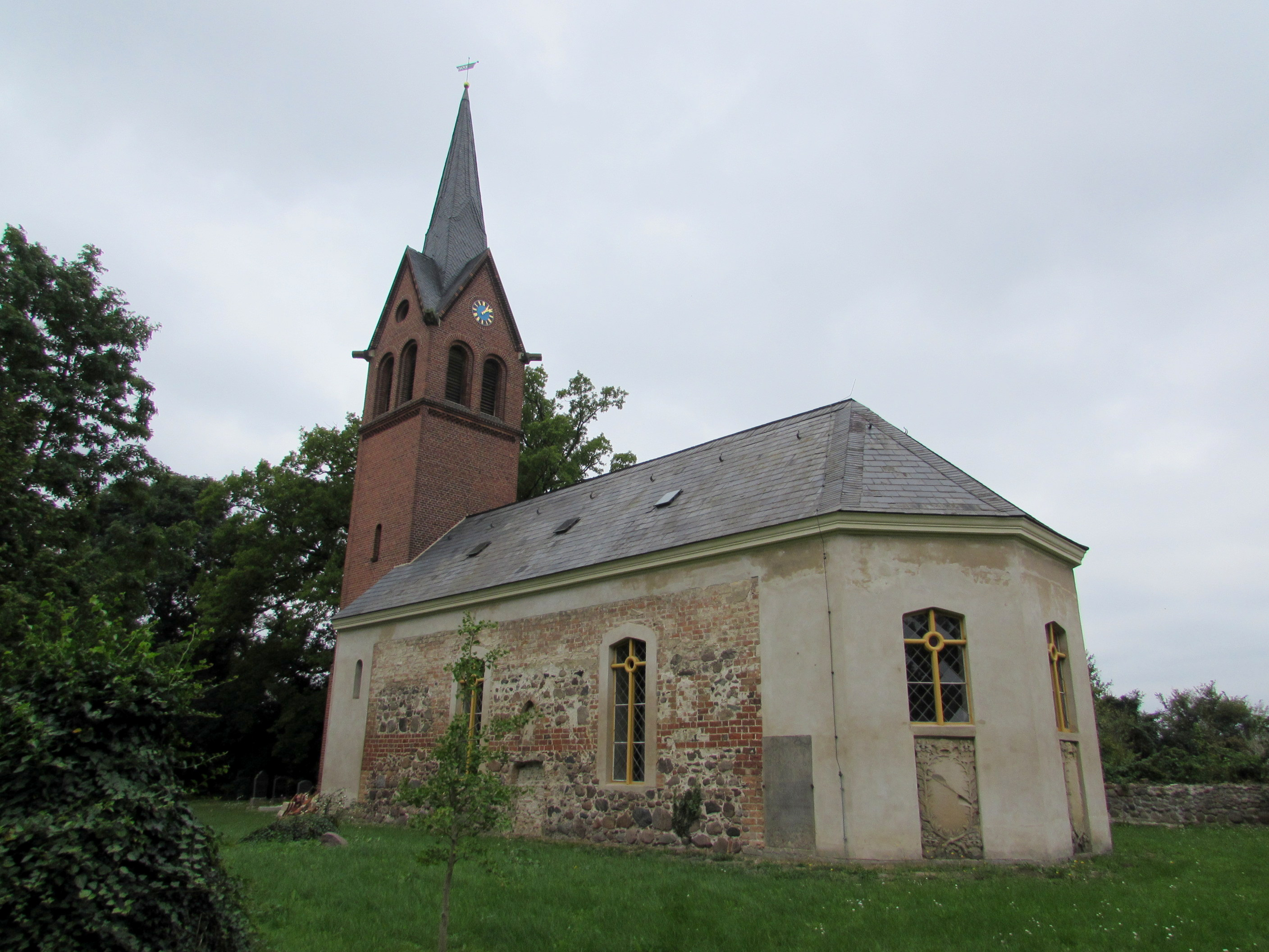 kirche lünow